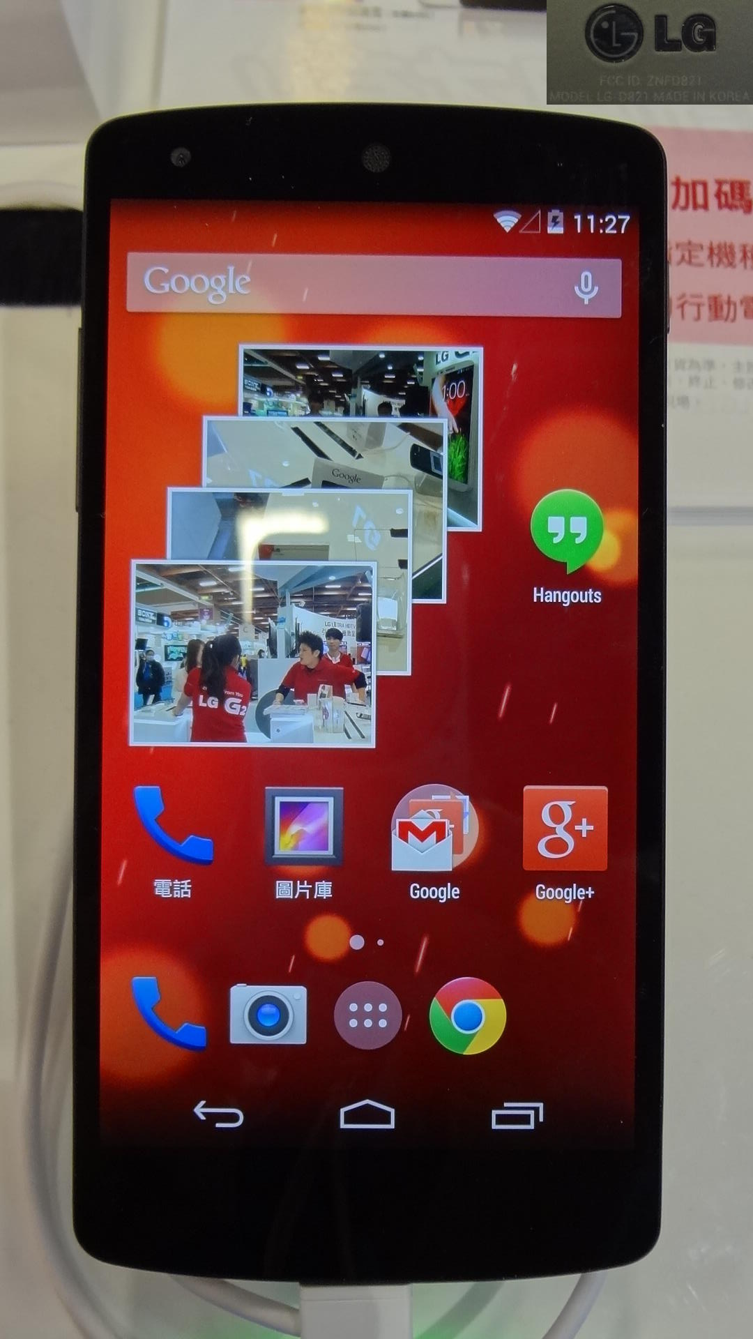 2013年資訊月，台灣樂金電器展示的Nexus 5智慧型手機LG-D821。